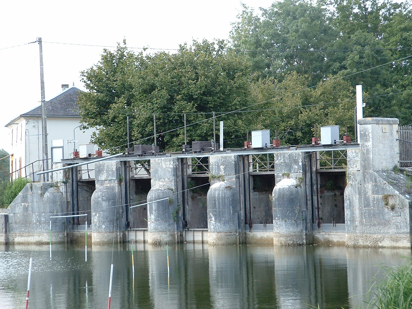 Ecluses de St Jean d'Angely (France) sur la Boutonne.